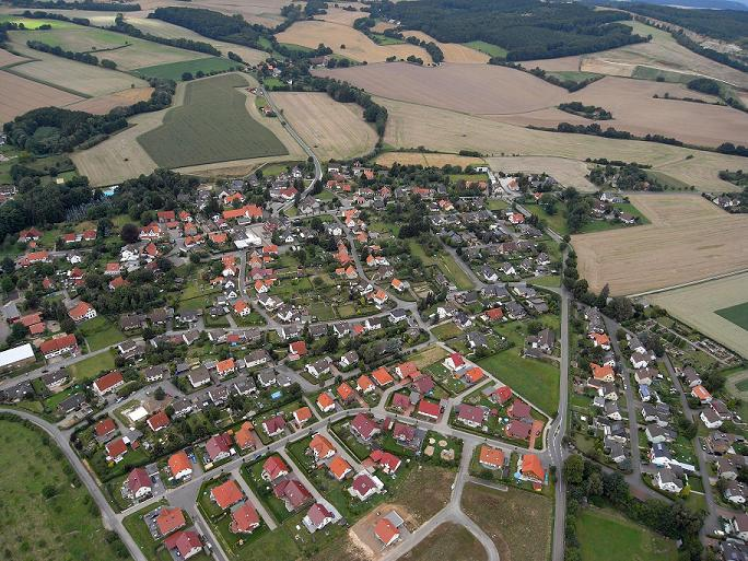 Kirchheide Luftbild